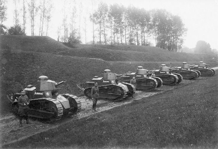 Lietuvos šarvuočių rinktinei priklausę lengvieji tankai Renault FT-17